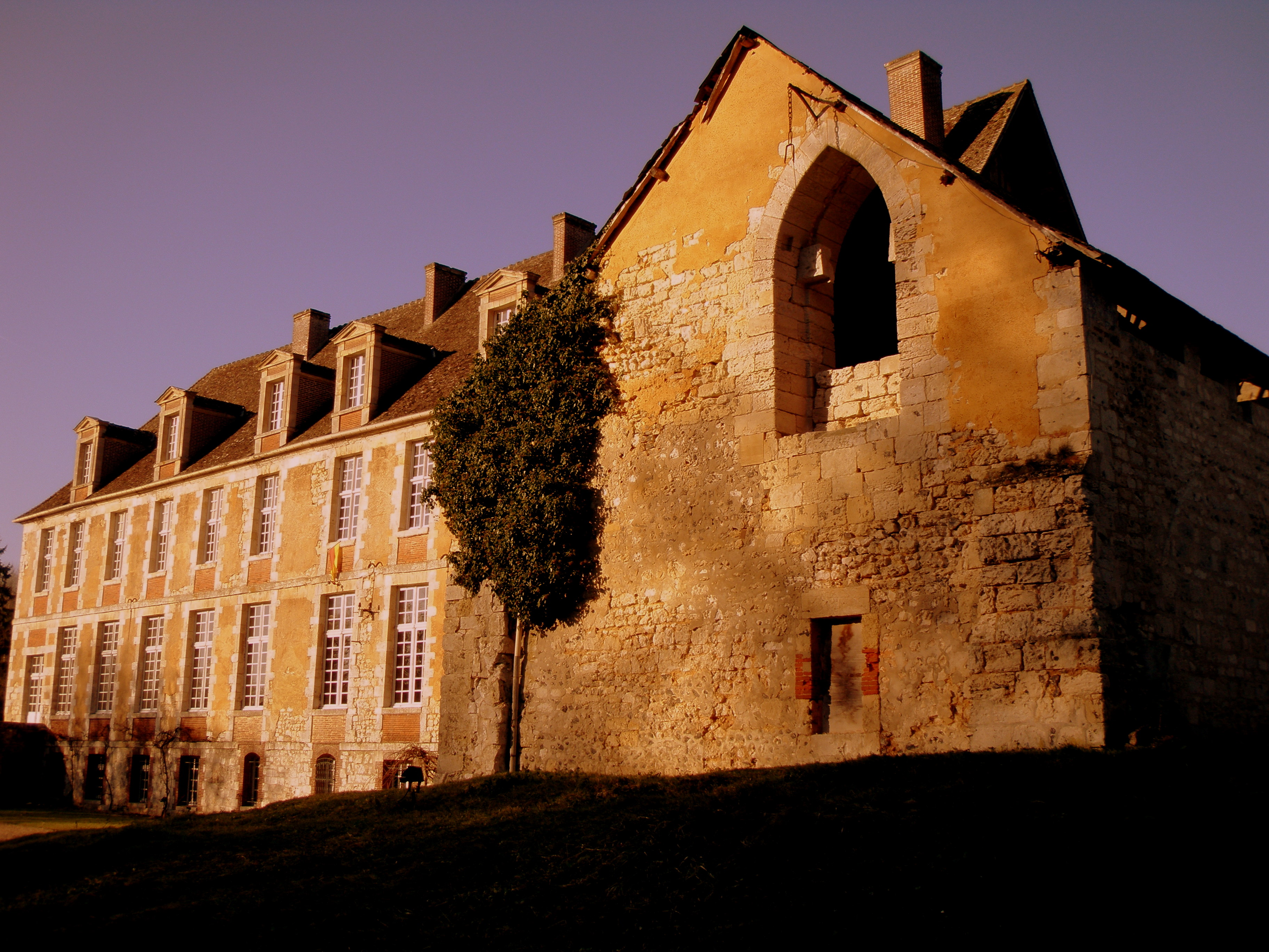 Le logis des moines de l'abbaye de Mortemer (Normandie)